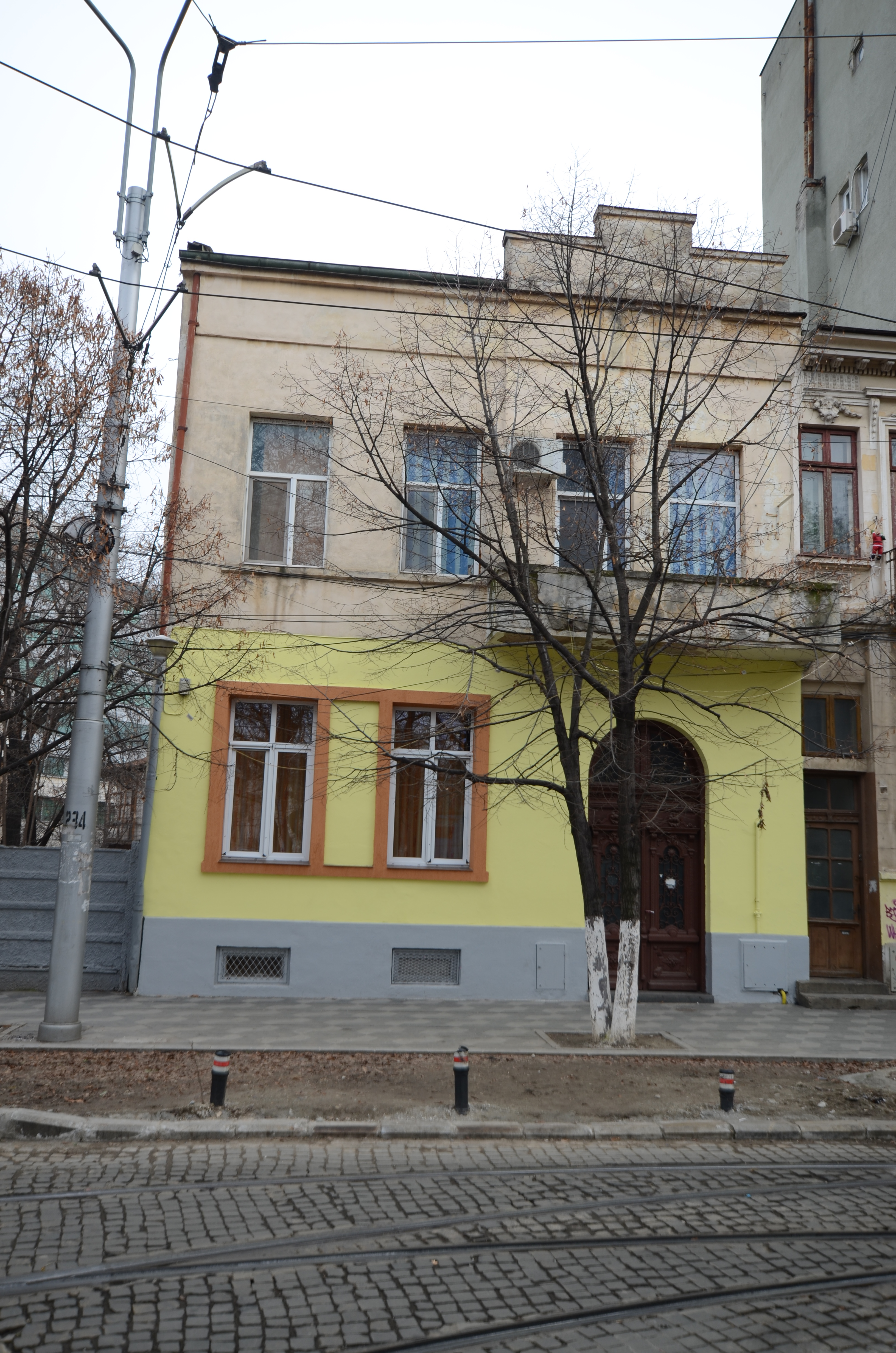 Casă, Str. Cavafii Vechi nr. 11, București